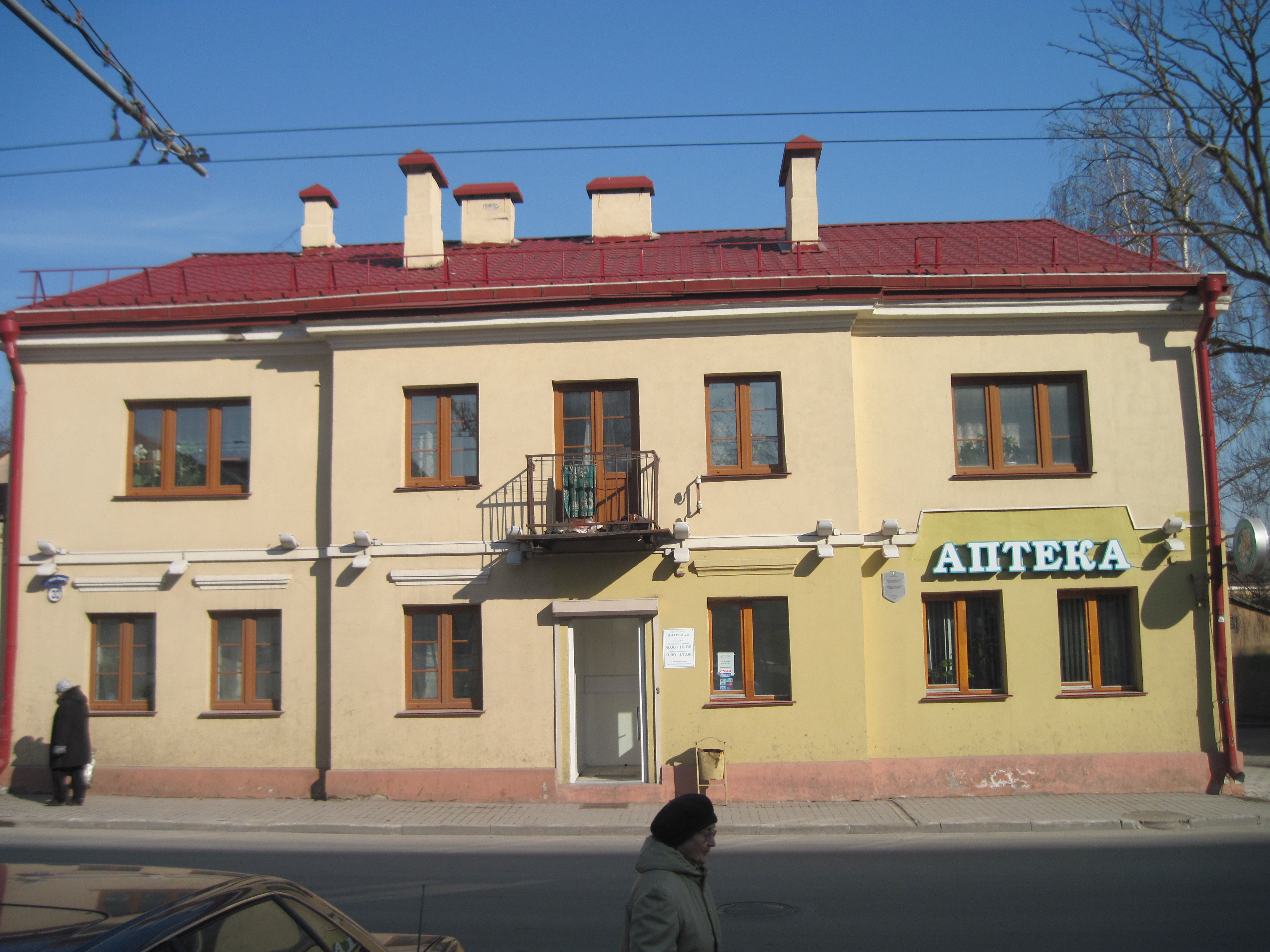 Забудова гістарычнага цэнтра Гродна. Вуліца К. Маркса, 30.